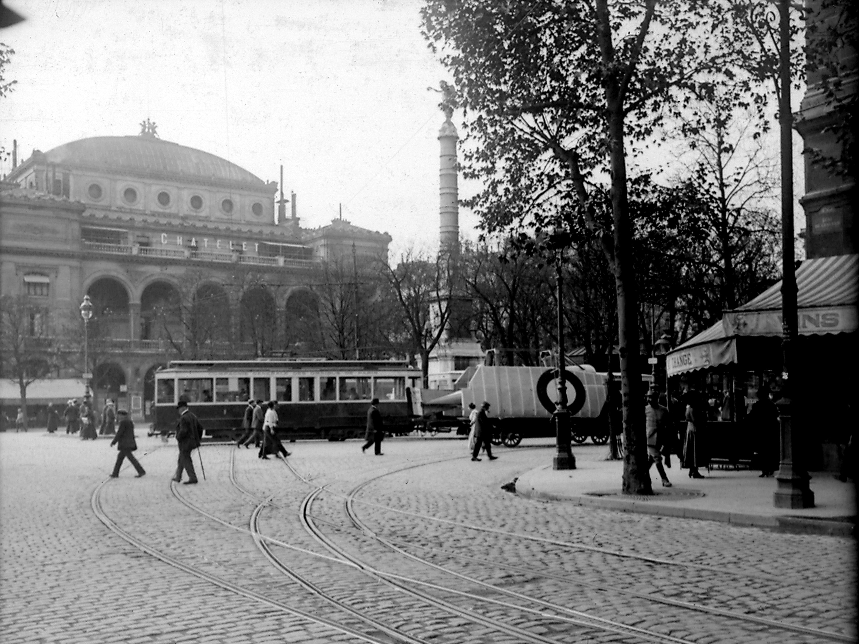 Photo de la Place du Châtelet pendant la guerre de 14-18. On y voit le théâtre du Châtelet et les ailes d'un avion démonté sur une remorque.